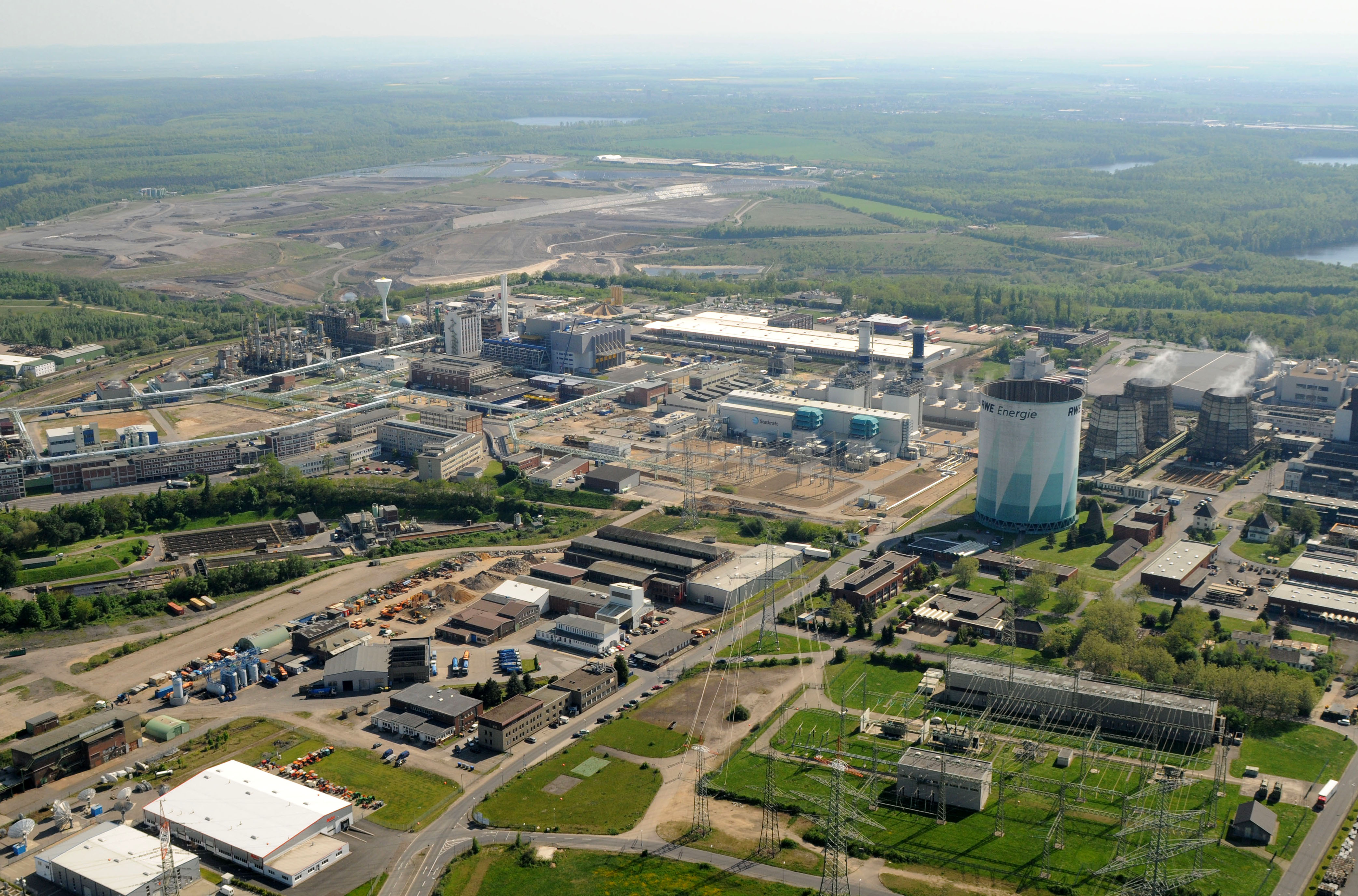 Luftaufnahme: Chemiepark Knapsack (links), Areal Kraftwerk Goldenberg (rechts) und 380/110-kV-Umspannanlage Knapsack (unten rechts); Hürth